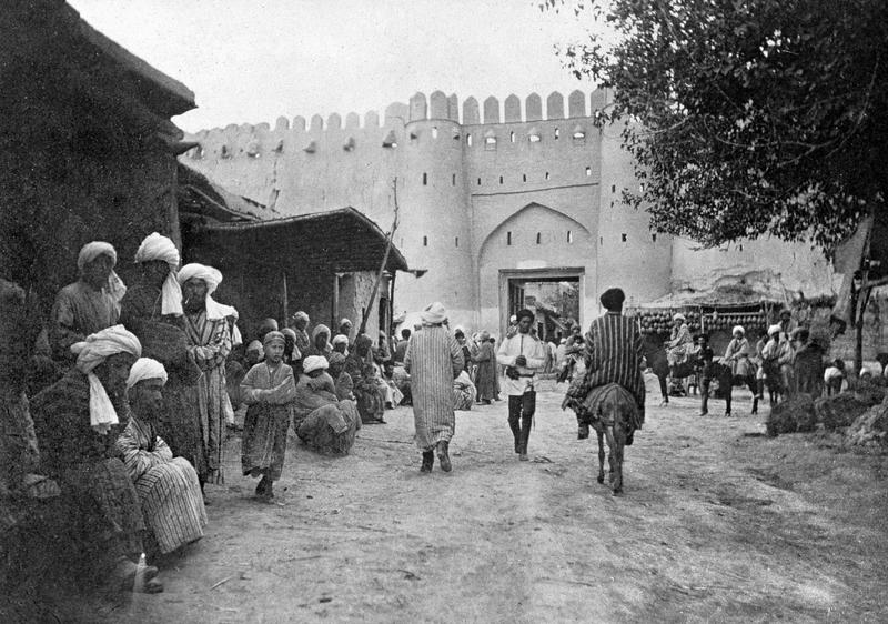 Чарджуй (бухарские владения). У городских ворот